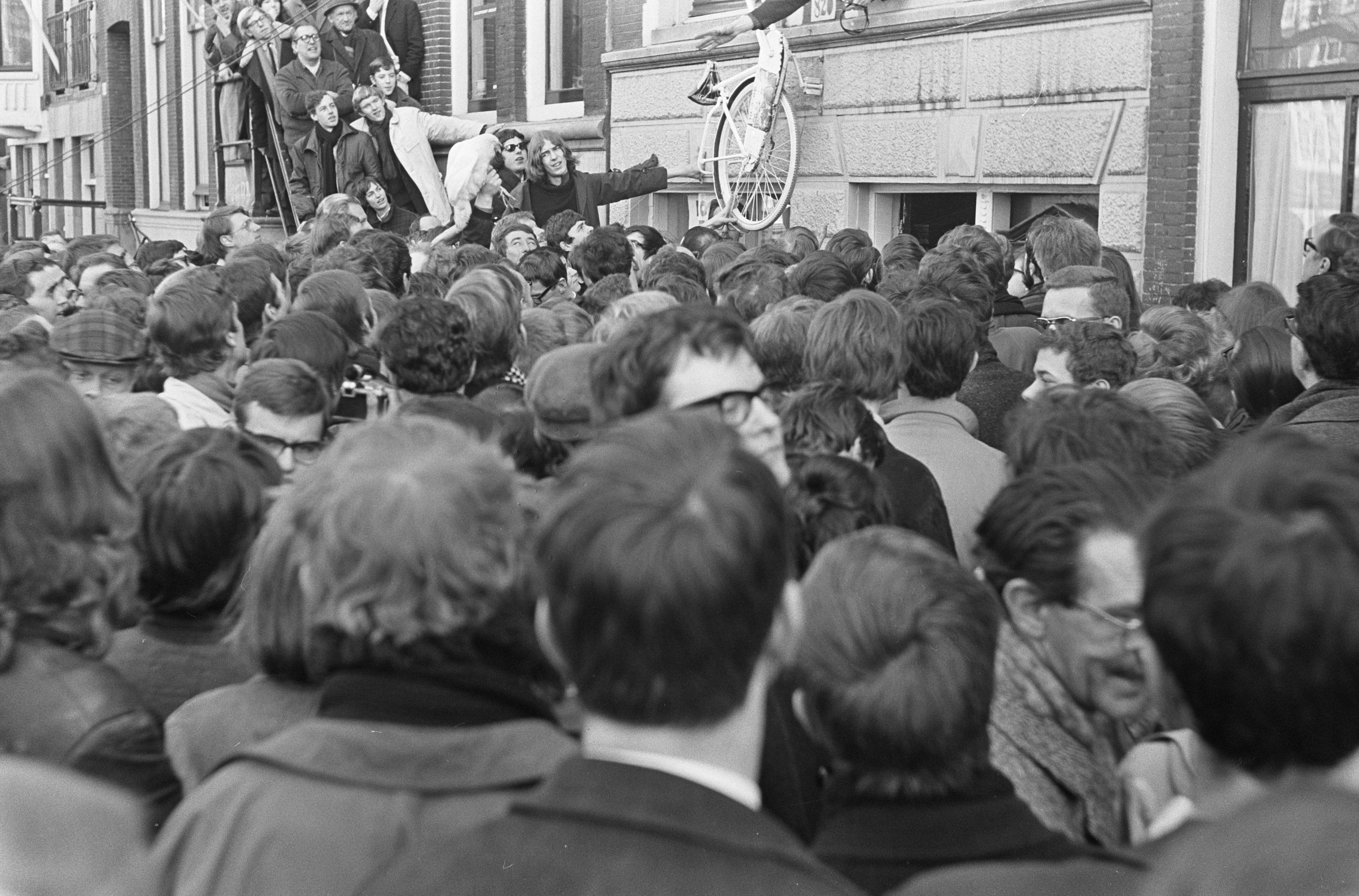 Collectie / Archief : Fotocollectie Anefo Reportage / Serie : [ onbekend ] Beschrijving : Openingsceremonie van de tentoonstelling 'Omdat mijn fiets daar stond' op de Prinsengracht te Amsterdam. Een witte fiets wordt aan de gevel gehangen. De tentoonstelling behelsde foto's van politieoptreden tijdens demonstraties enige dagen ervoor. Het kwam wederom tot een confrontatie met de politie toen de menigte niet snel genoeg voldeed aan het bevel zich te verspreiden Datum : 19 maart 1966 Locatie : Amsterdam, Noord-Holland Trefwoorden : demonstraties, fietsen, tentoonstellingen Fotograaf : Evers, Joost / Anefo Auteursrechthebbende : Nationaal Archief Materiaalsoort : Negatief (zwart/wit) Nummer archiefinventaris : bekijk toegang 2.24.01.05 Bestanddeelnummer : 918-9360